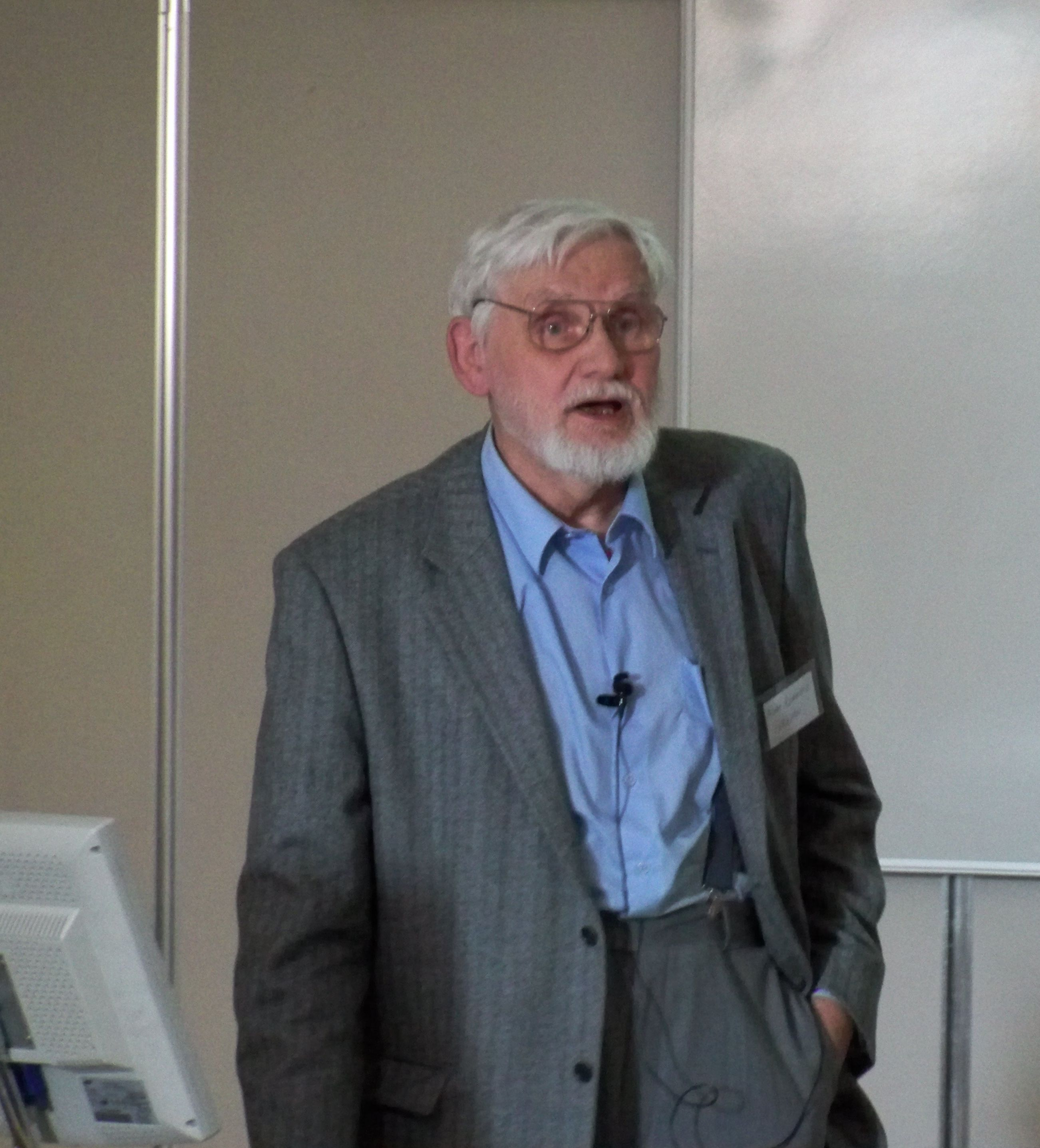 Prof. Adam Łomnicki prezentujący referat na 55 Warsztatach Biologii Ewolucyjnej w Warszawie